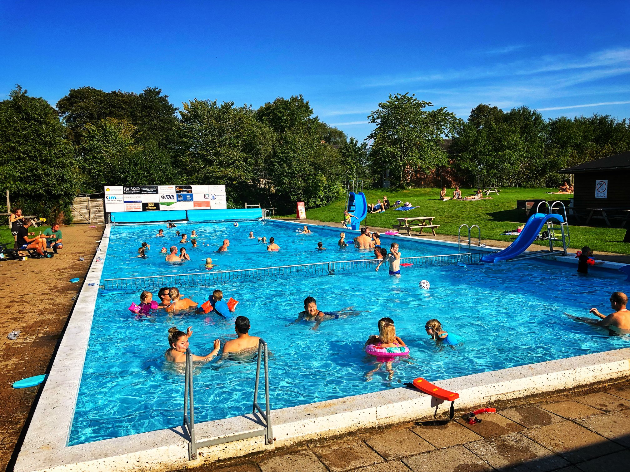 Sensommer i Voldby Badet.